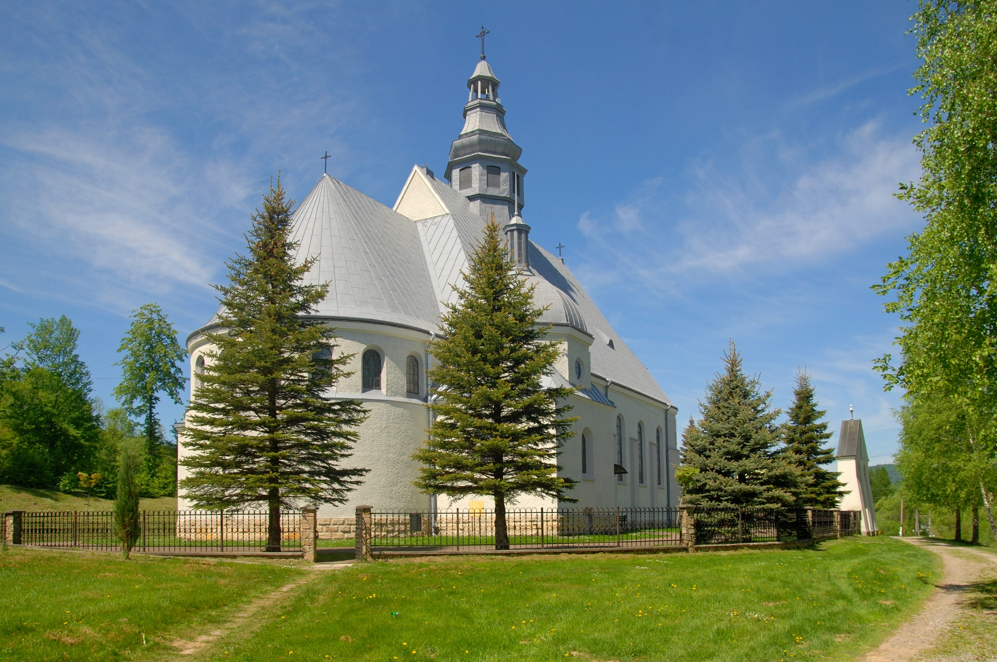 wieś Bączal Dolny